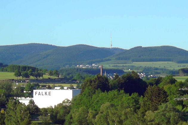 Hochregallager der Firma Falke in Schmallenberg. Im Hintergrund der Fernsehturm Hunau., Germany.